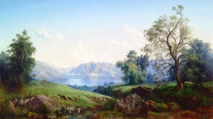 Paisaje de Laguna de Aculeo